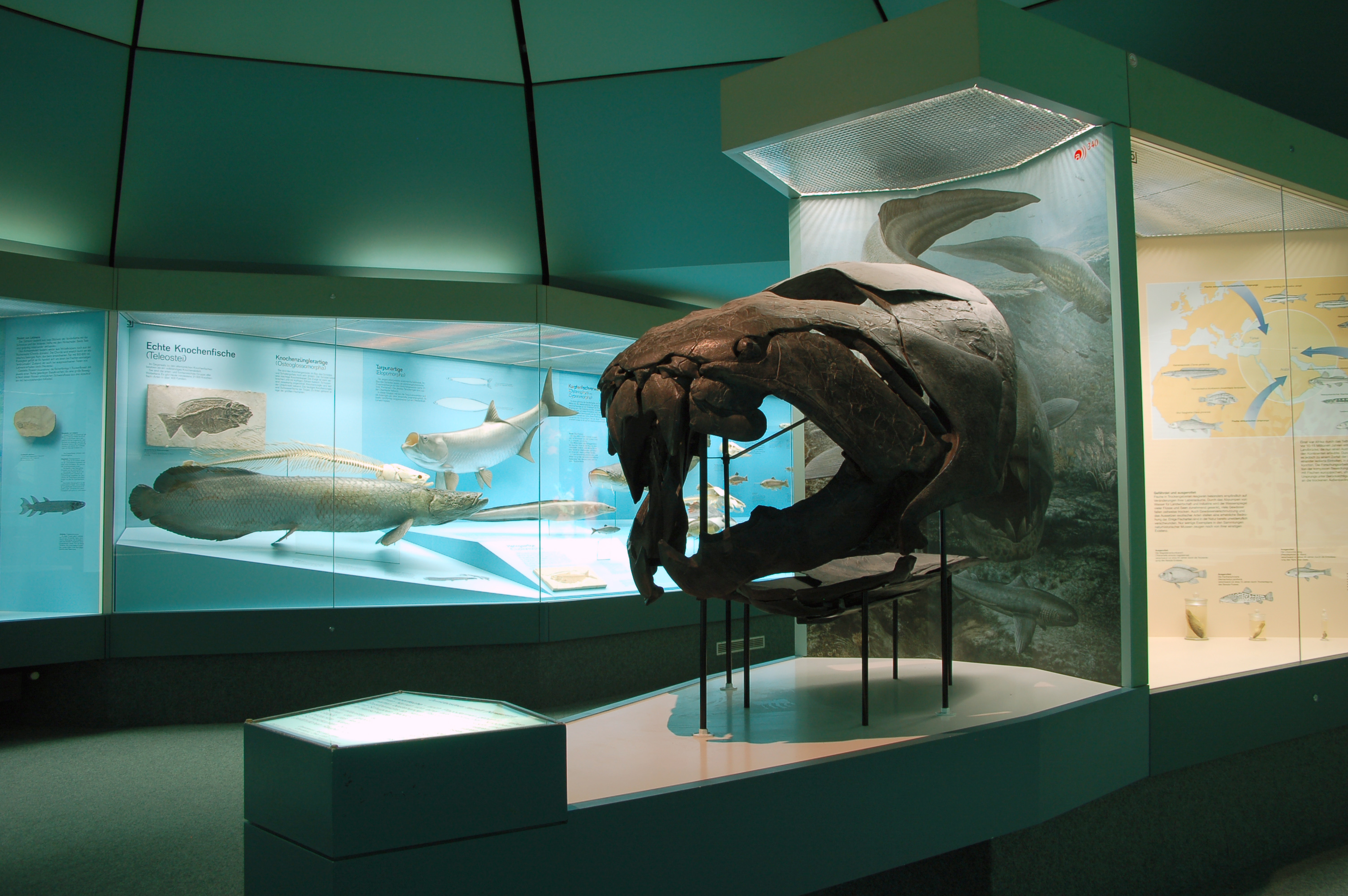 Skull of Dunkleosteus Placoderm in the Senckenberg Museum in Frankfurt am Main